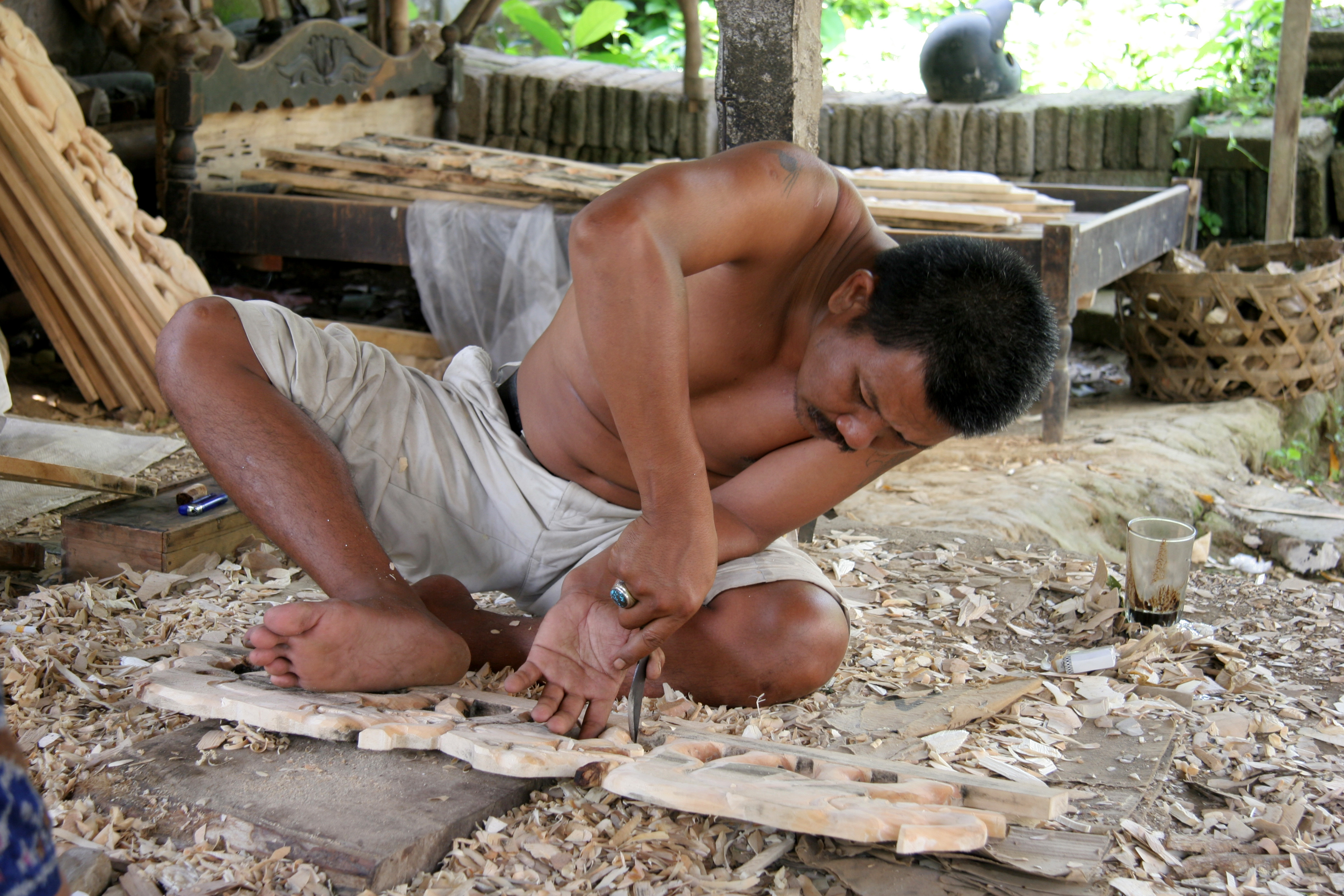 Bali pres d'ubud sculpteur sur bois